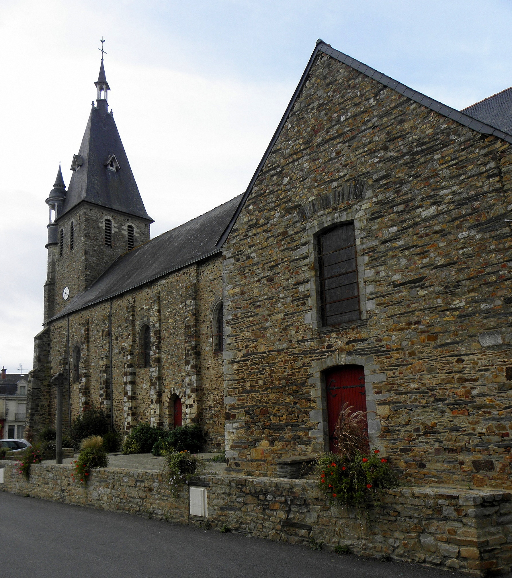 Église Saint-Pierre et Saint-Paul du Grand-Fougeray (35). Flanc sud.